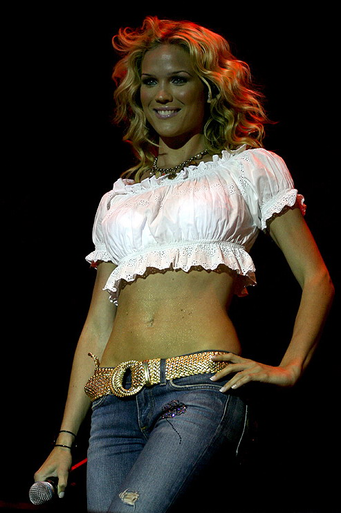 Marie @ Gatufesten in Sundsvall, Sweden. July 2006.